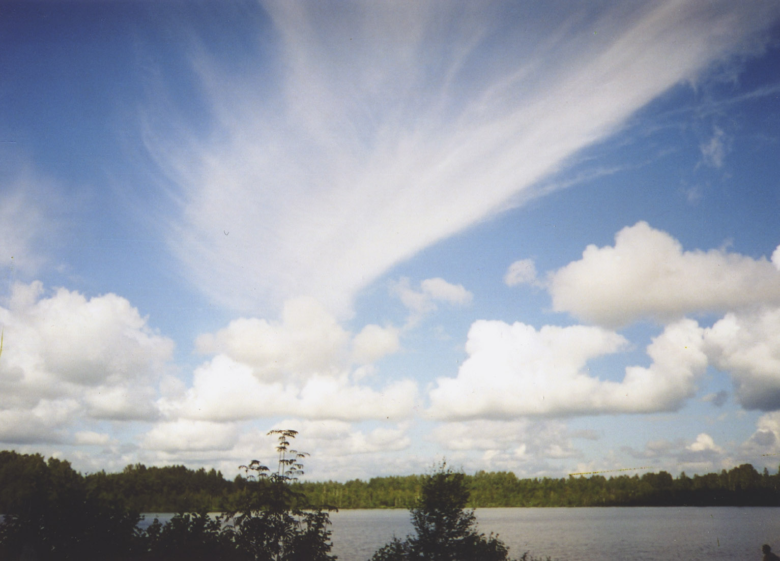 lake Svetlojar, the Nizhniy Novgorod region,village Vladimirskoe